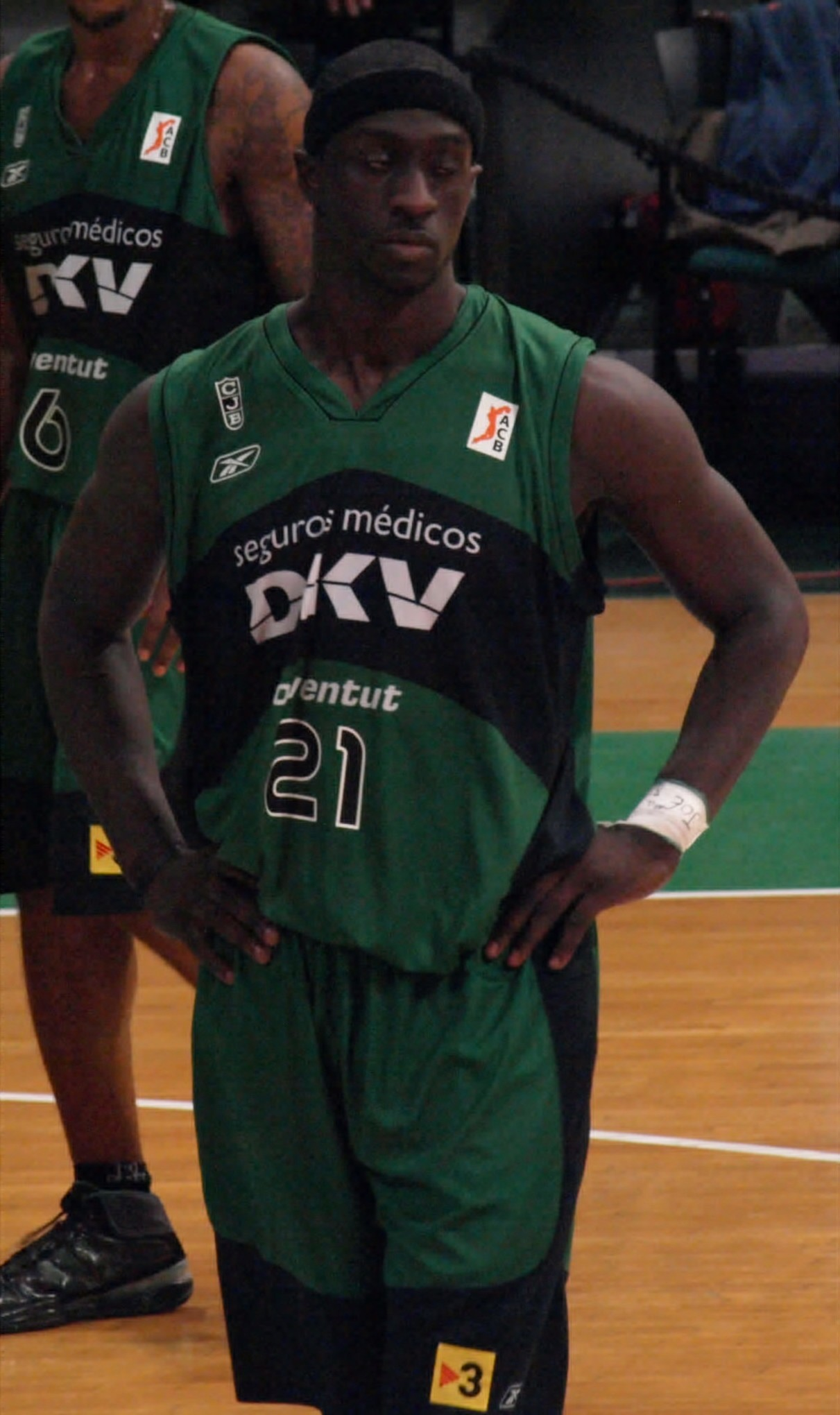 Pops Mensah-Bonsu, en el partido que enfrentó al al DKV Joventut y al MMT Estudantes de liga ACB en el Olímpico de Badalona en 2008